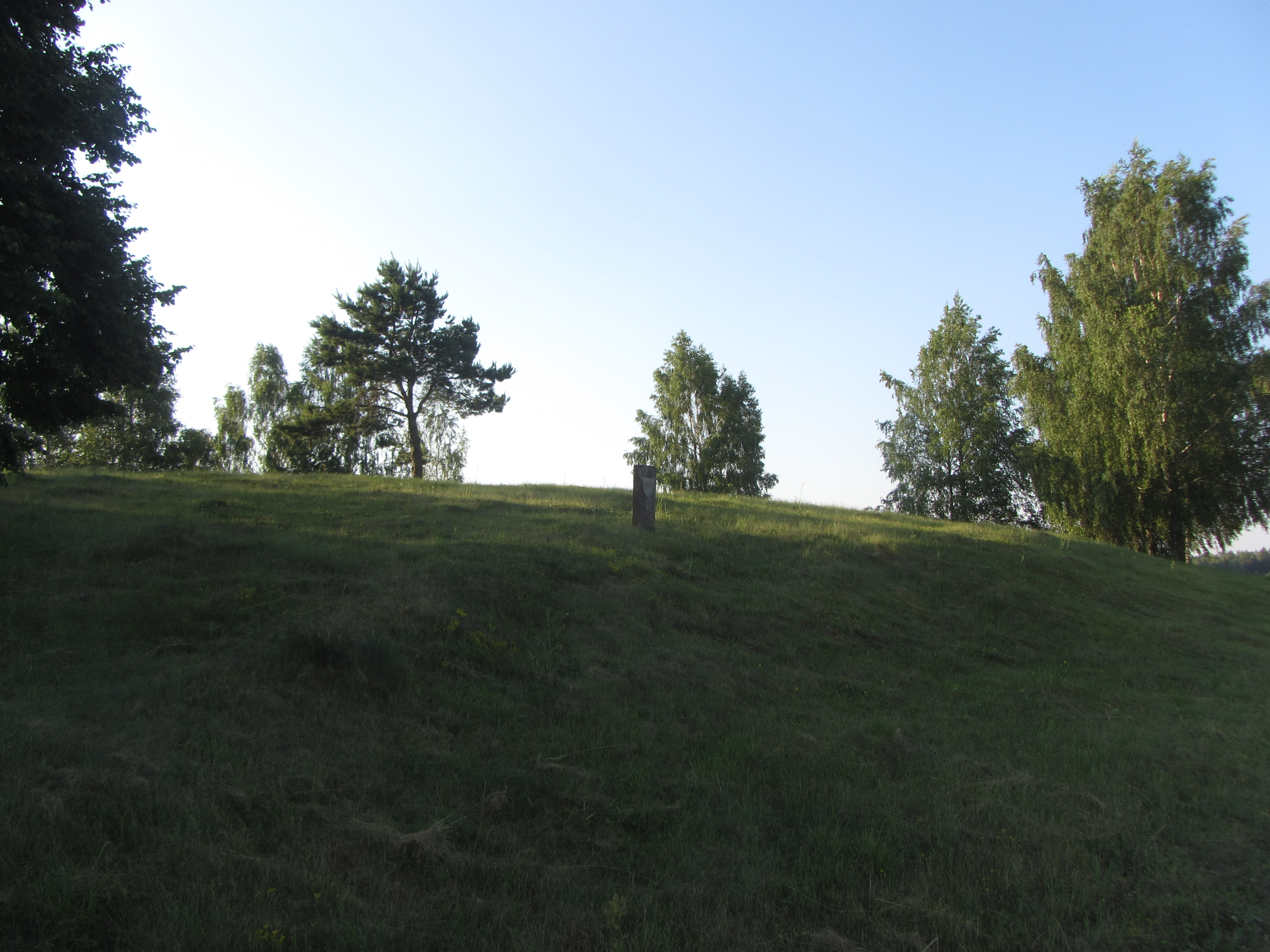 Noragėliai, Lithuania